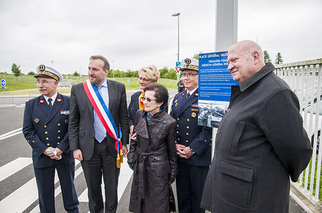 Inauguration de la place Valérie andre a bretigny-sur-orge par le médecin general Valérie andre